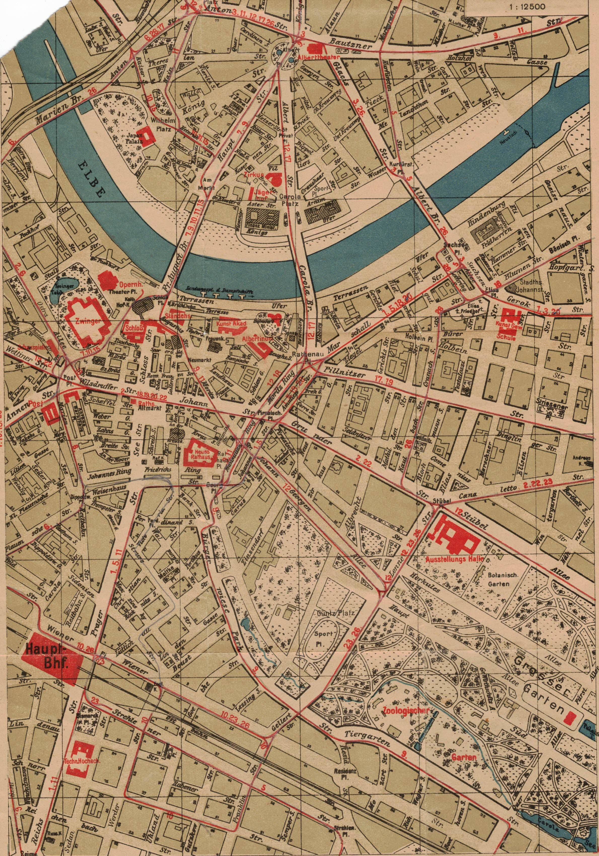 Stadtplan von Dresden, ca. 1922